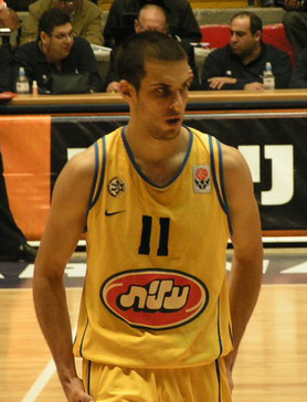 יותם הלפרין